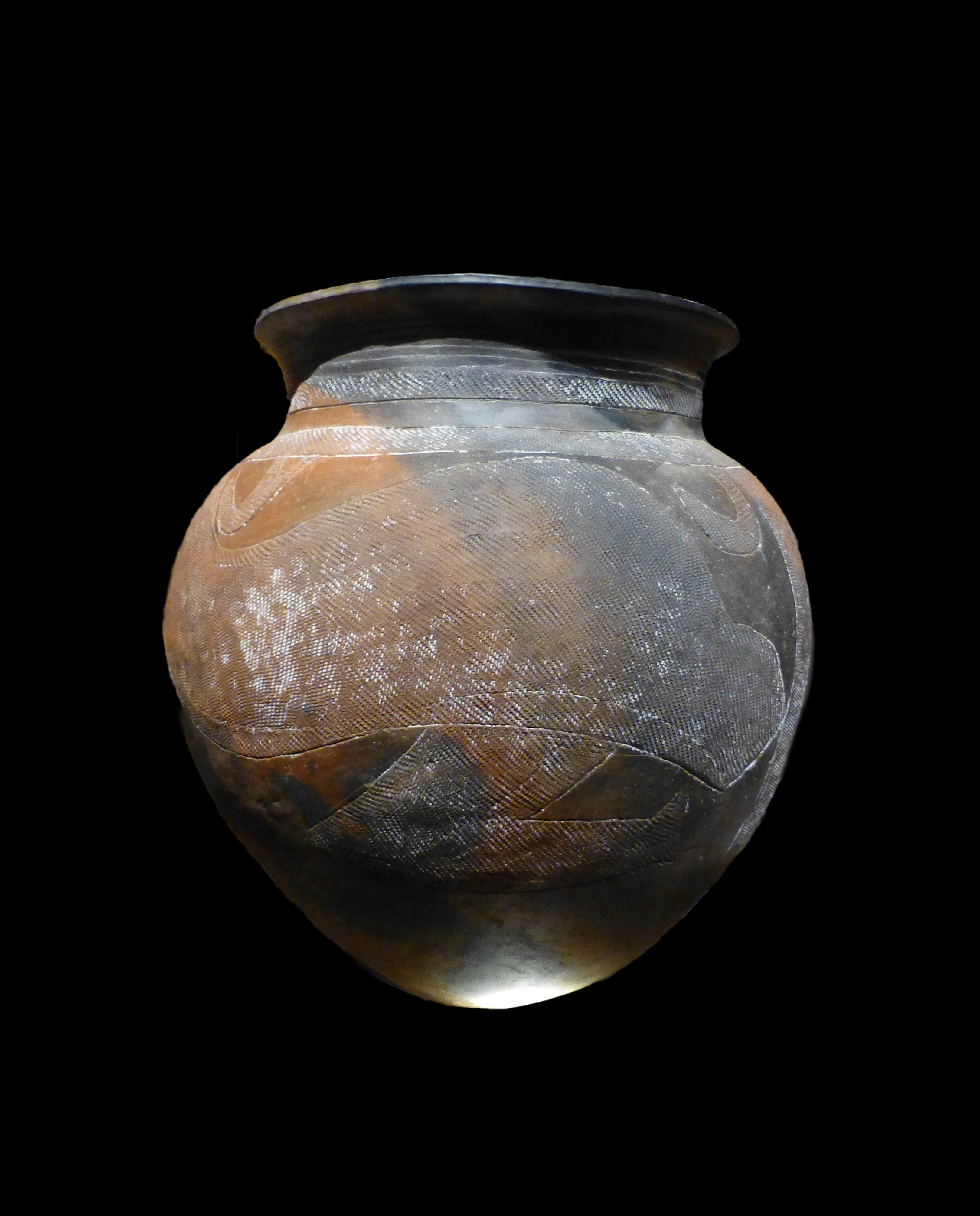 Jarre. Nigeria (Giri, population Gwari). Fin du XXe siècle. Terre cuite, farine de manioc. Lyon. Musée des Confluences.